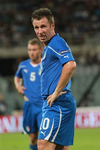 Il giocatore italiano durante Italia-Slovenia di qualificazione agli Europei 2012